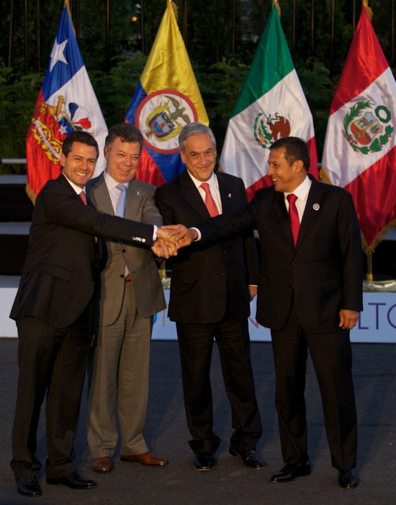 VI Cumbre de la Alianza del Pacífico. Enrique Peña Nieto, Juan Manuel Santos, Sebastián Piñera y Ollanta Humala. Santiago de Chile, Chile. 27 enero 2012